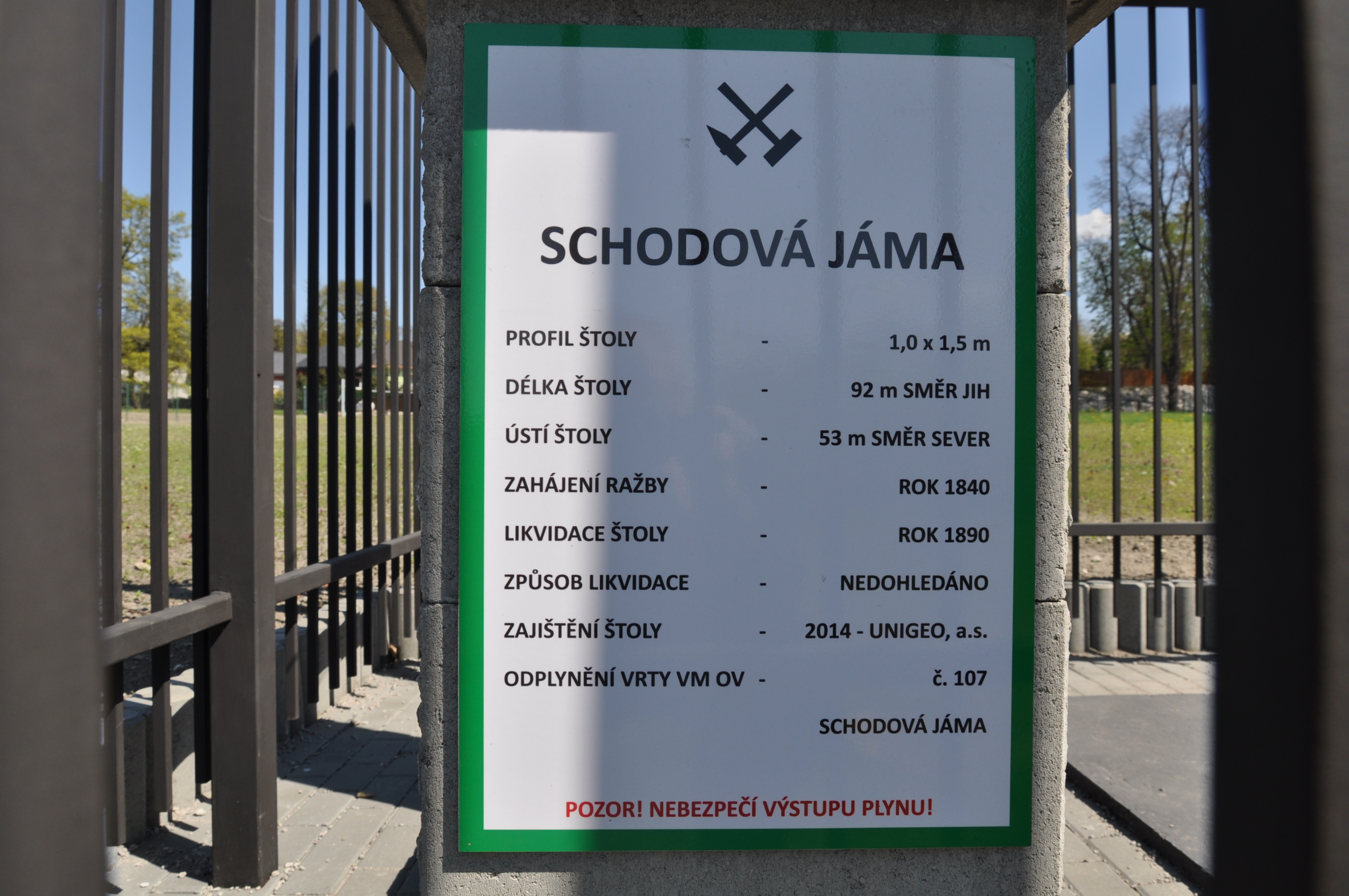 Schodová jáma (Treppen Schacht), Slezská Ostrava, Informační tabule